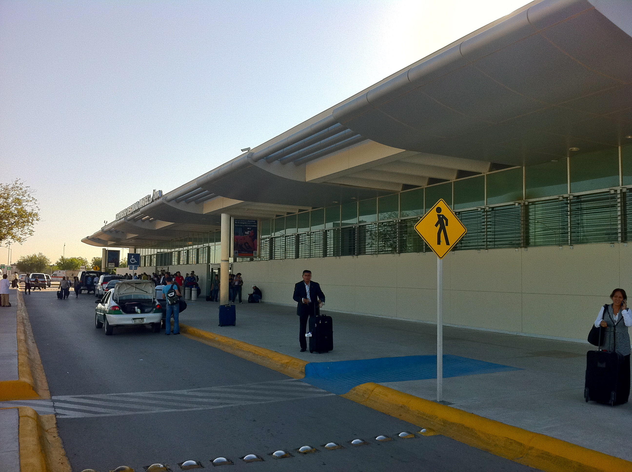 Aeropuerto Internacional de Ciudad Juárez.